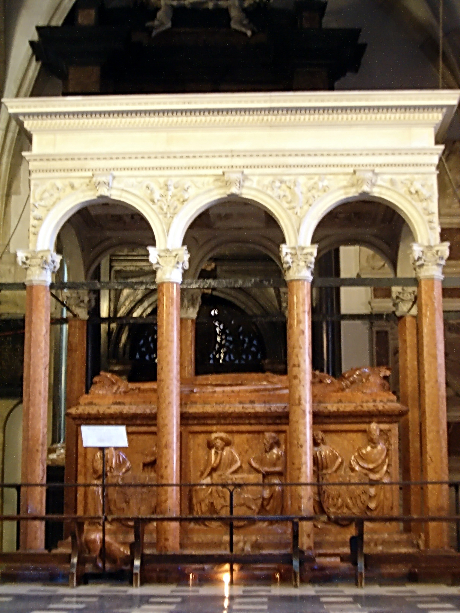 Nagrobek Władysława II Jagiełły w Królewskiej Katedrze na Wawelu